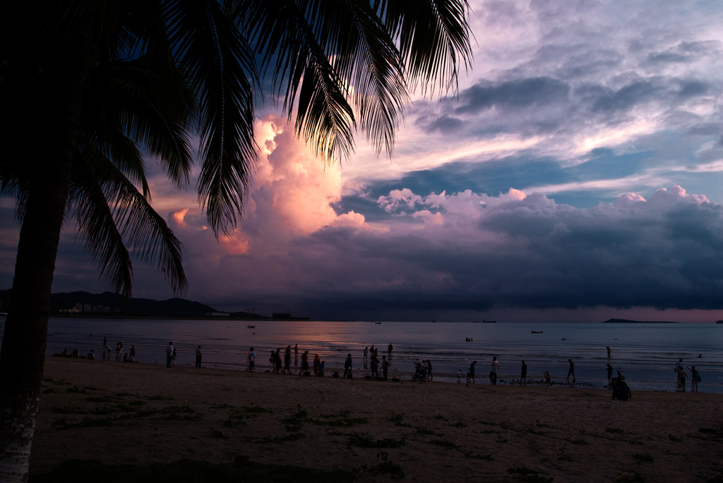 三亚湾晚霞--爵士鼓手